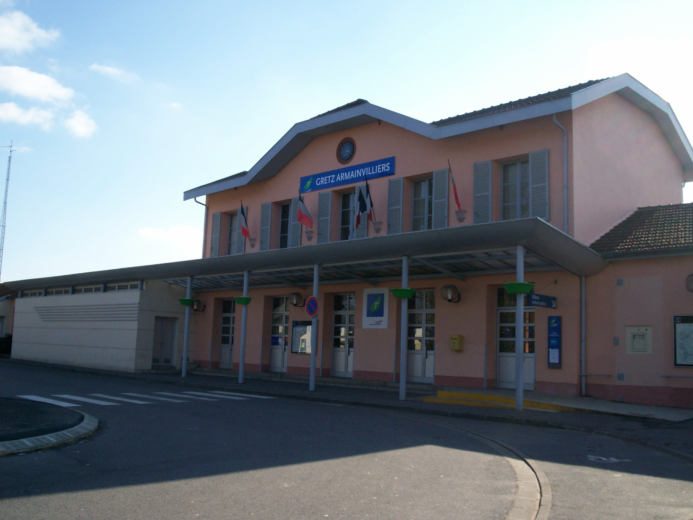 Gare de Gretz-Armainvilliers